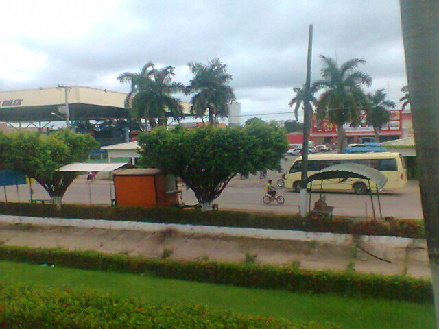 Cidade de Breu Branco